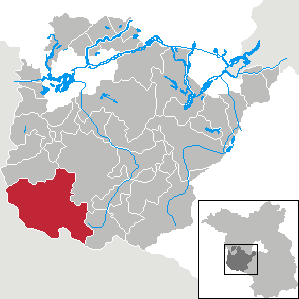 Wiesenburg/Mark in Brandenburg (Country) - District Potsdam-Mittelmark